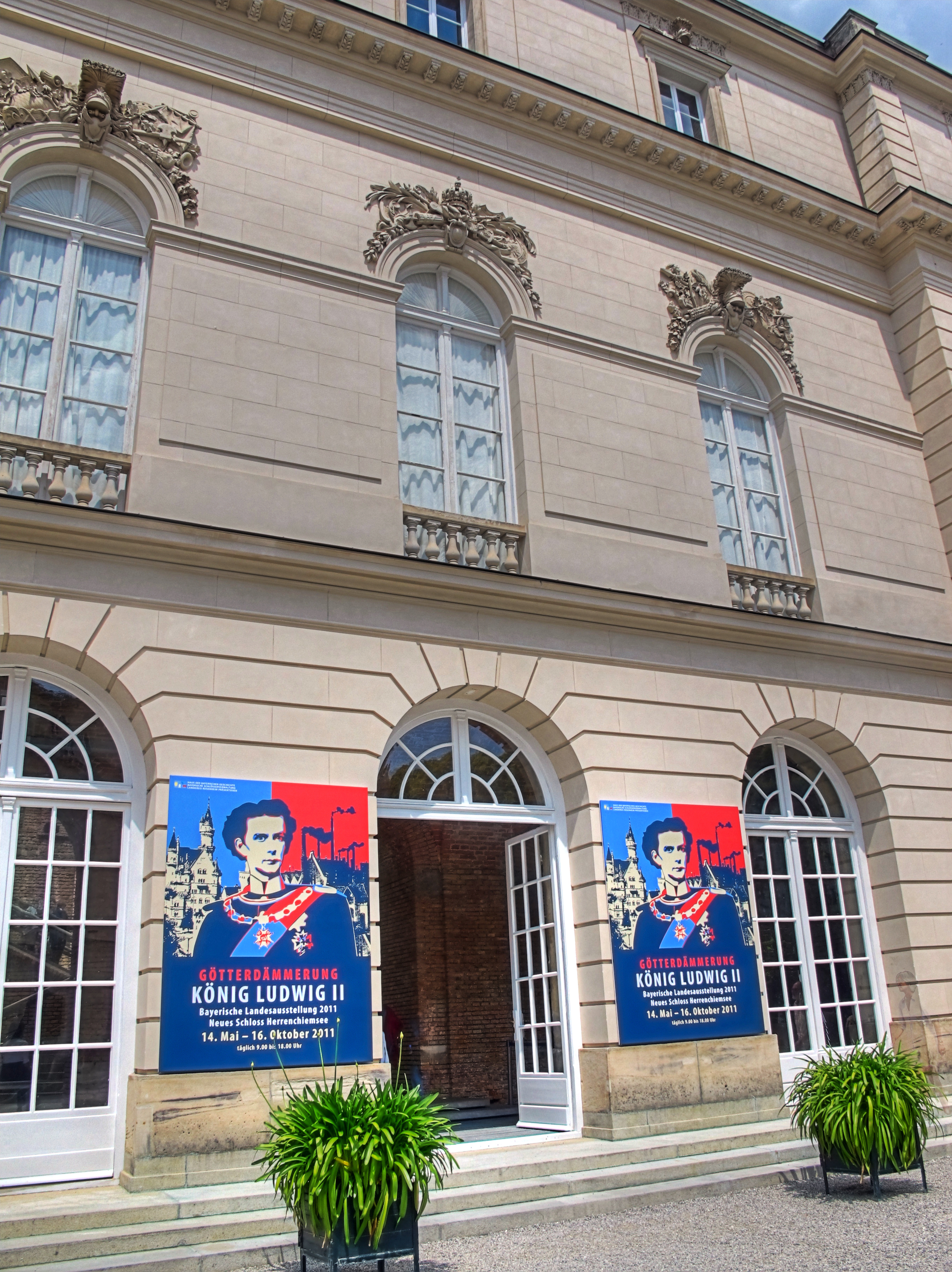 Deutschland, Bayern, Landkreis Rosenheim, Gemeinde Chiemsse, Schloss Herrenchiemsee, Nordflügel, Bayerische Landesausstellung 2011: "Götterdämmerung: König Ludwig II. und seine Zeit"